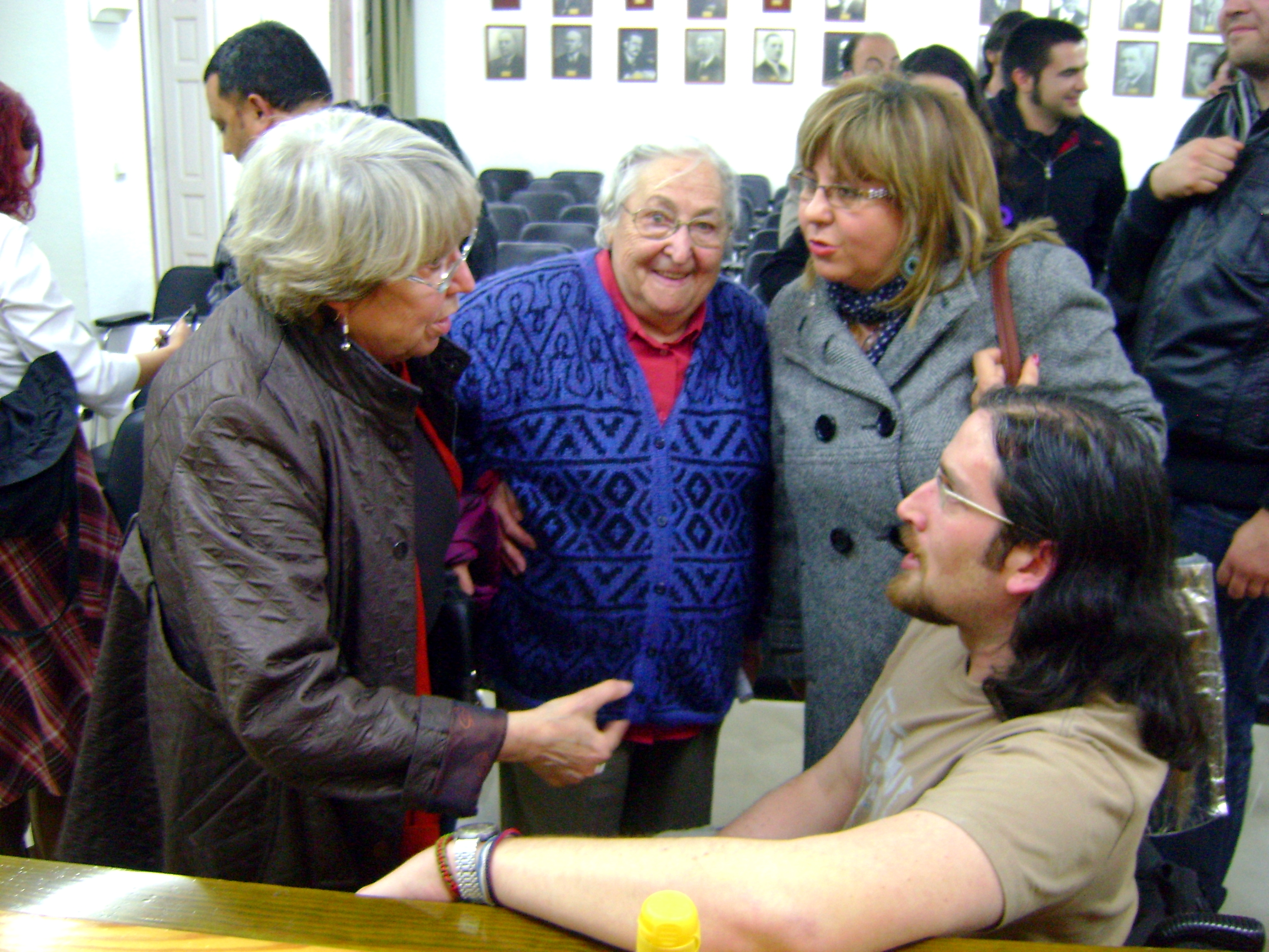 Josefina Samper y Yania Camacho, Soco y yo el 23 de marzo de 2012